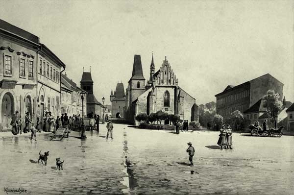 Česky: Rakovník, náměstí